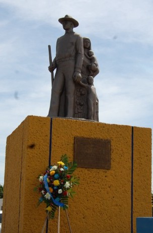 monumento en san luis